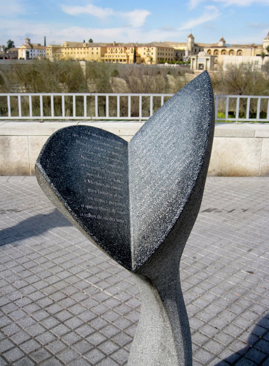 Obra del escultor Luis Celorio, el cual lo cedió gratuitamente a la ciudad, está situado junto a la Torre de la Calahorra (Córdoba). Representa la cola de un pez en cuyas aletas está impreso el poema San Rafael (Córdoba), del Romancero gitano (1924-1927), libro de poesía de Federico García Lorca. Fue inaugurado por la alcaldesa de Córdoba el 6 de junio de 2005.